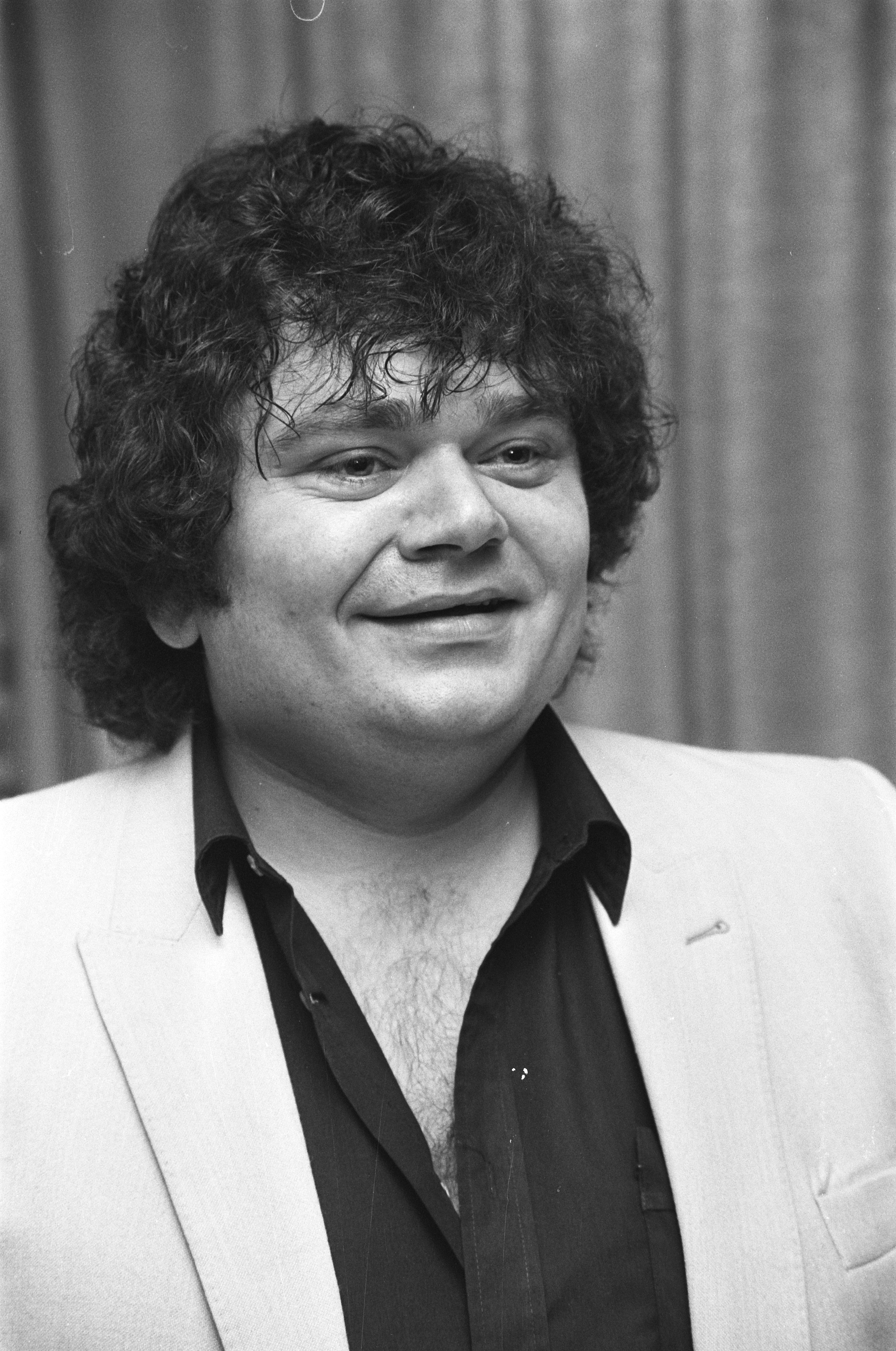 Collectie / Archief : Fotocollectie Anefo Reportage / Serie : [ onbekend ] Beschrijving : Opnamen in Flint in Amersfoort van programma over zanger Andre Hazes dat de TROS 26 maart aanstaande uitzendt. Andre Hazes Datum : 5 februari 1982 Locatie : Amersfoort Trefwoorden : OPNAMEN, PROGRAMMAS, zangers Persoonsnaam : Hazes, André Instellingsnaam : TROS Fotograaf : Dijk, Hans van / Anefo Auteursrechthebbende : Nationaal Archief Materiaalsoort : Negatief (zwart/wit) Nummer archiefinventaris : bekijk toegang 2.24.01.05 Bestanddeelnummer : 931-9549